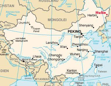 Lage der Stadt Hulin Als Bild wurde von Bild:Changchun Lage.jpg genommen und der Punkt versetzt.